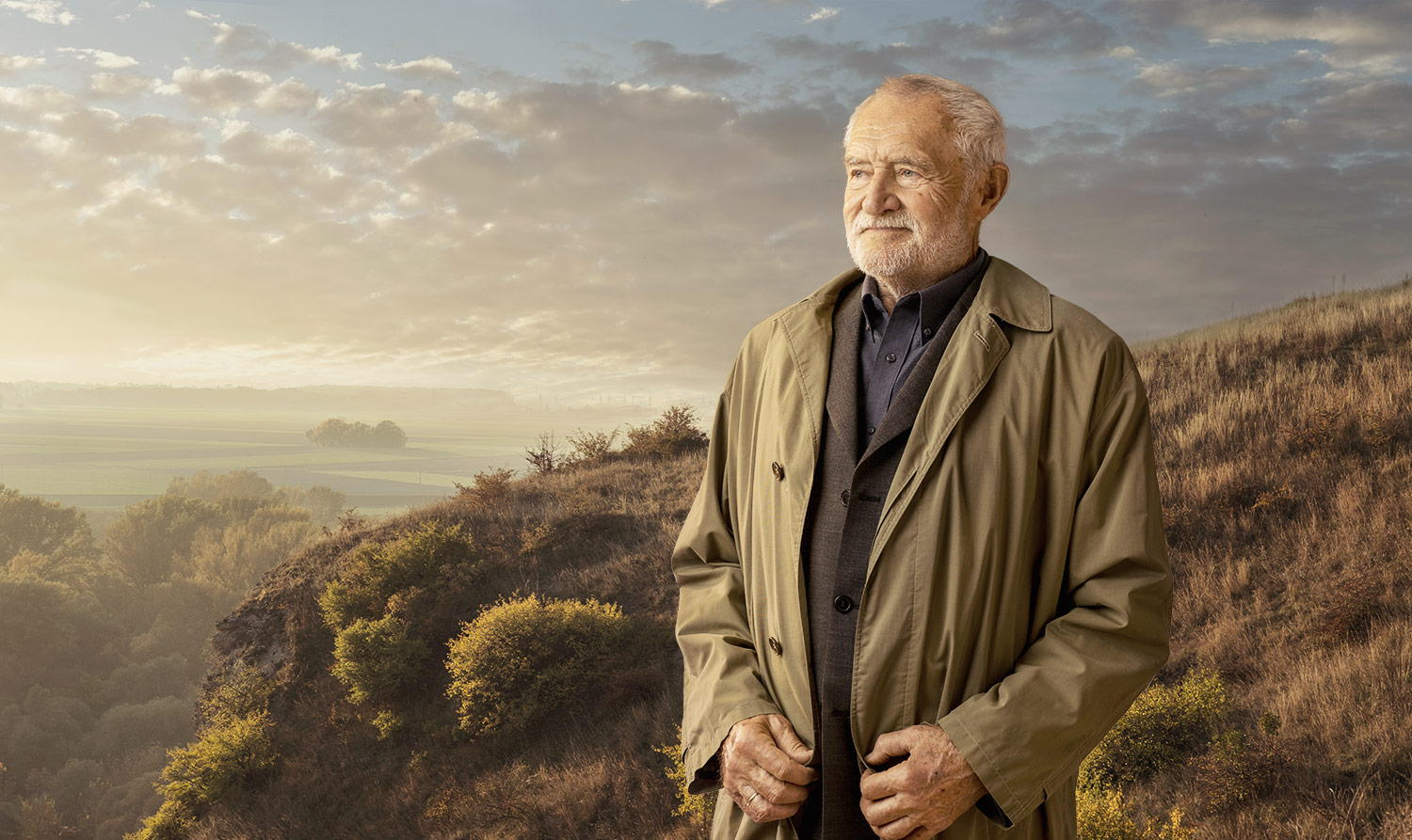 Старик